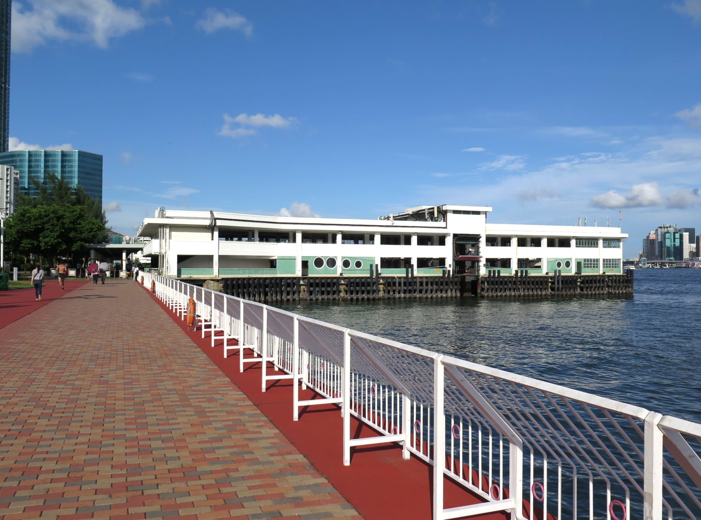 Hung Hom Pier Bus Terminal